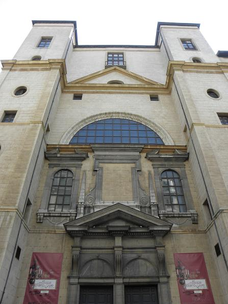 façade de la chapelle de la Trinité (Lyon)